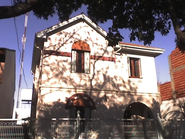 Casa de Luis Monetti, interventor militar del municipio de Merlo en la década de 1960, futuro museo municipal.